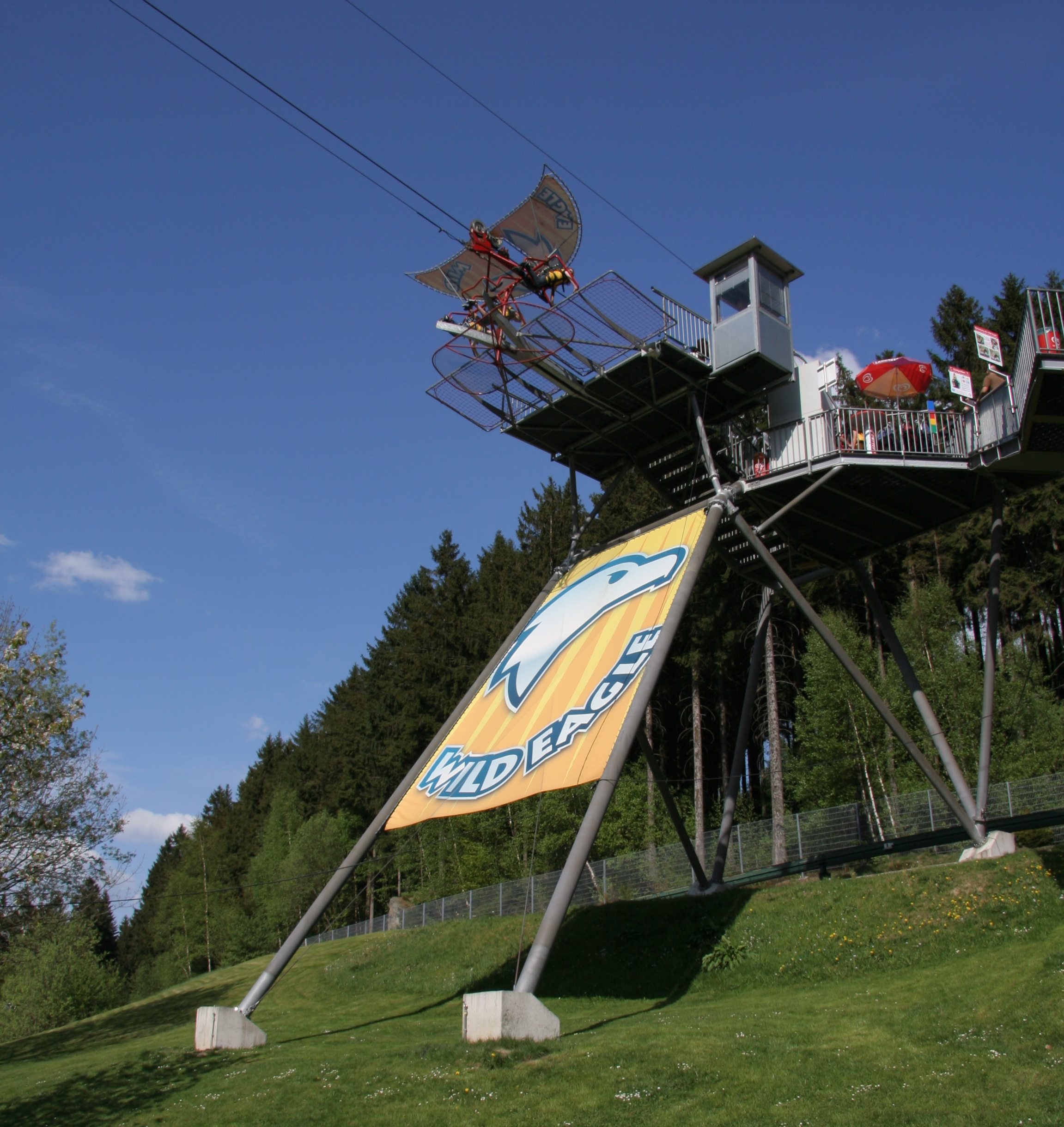 Wild Eagle, Drachenflug an einer Seilkonstruktion, Fahrgeschäft im Freizeitpark Fort Fun